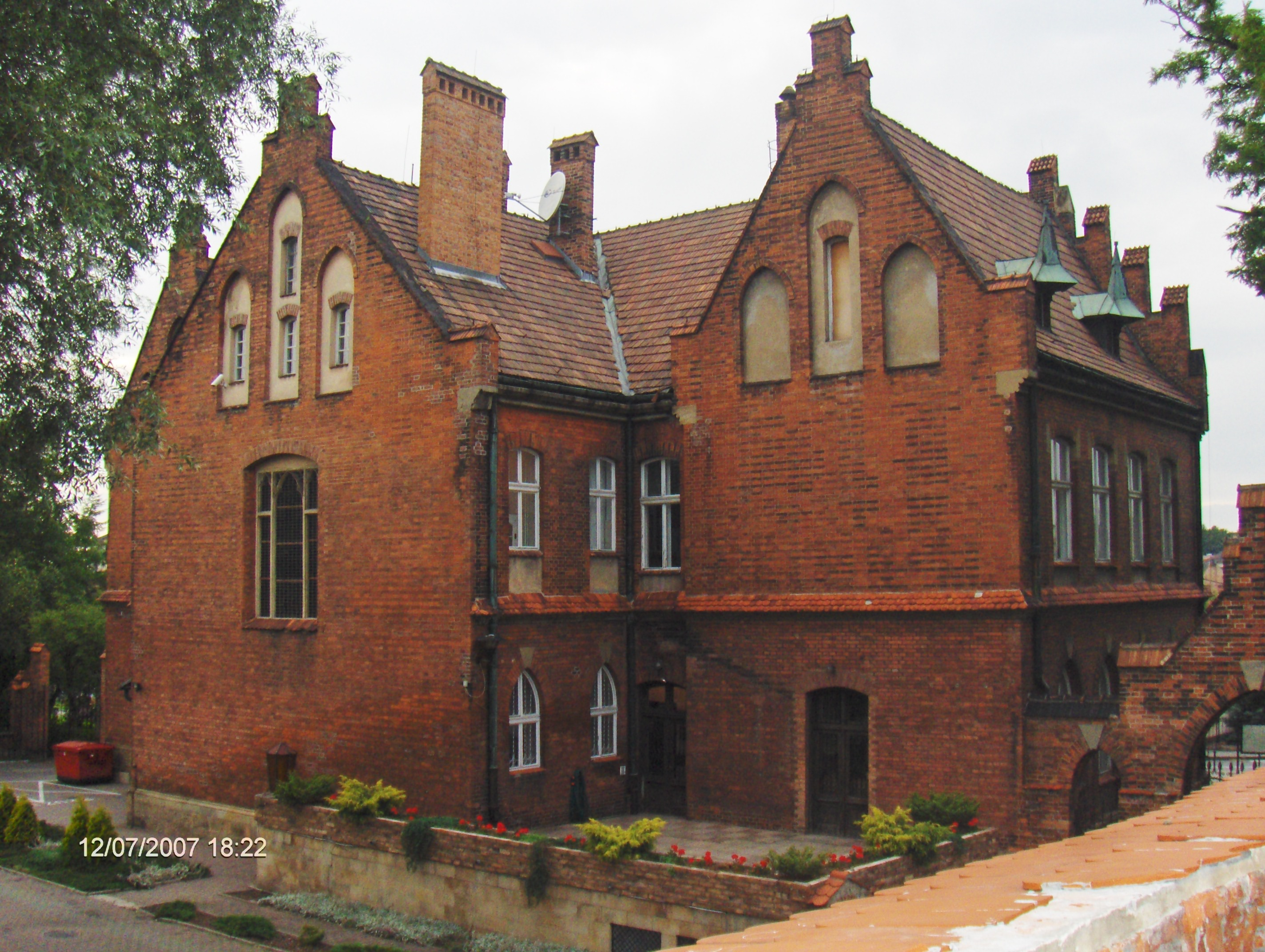 Wieliczka, ul. Dembowskiego 2 - dawna Szkoła Górnicza i Muzeum Salinarne (tzw. Sztygarówka), 1898 (zabytek nr A-576/M)